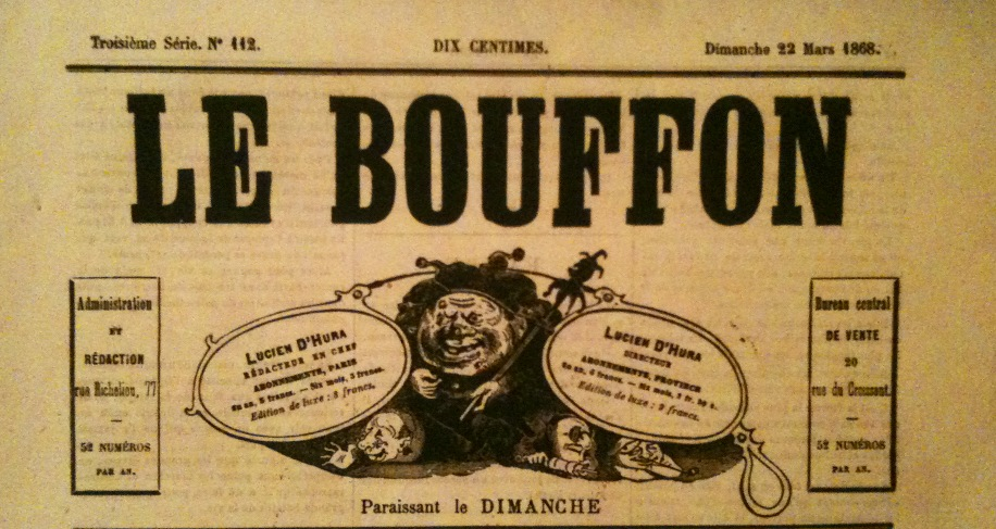 Head title from Le Bouffon, dimanche 22 mars 1868, designer unknown, dir. : Lucien D'Hura [Charles-Lucien Huard]